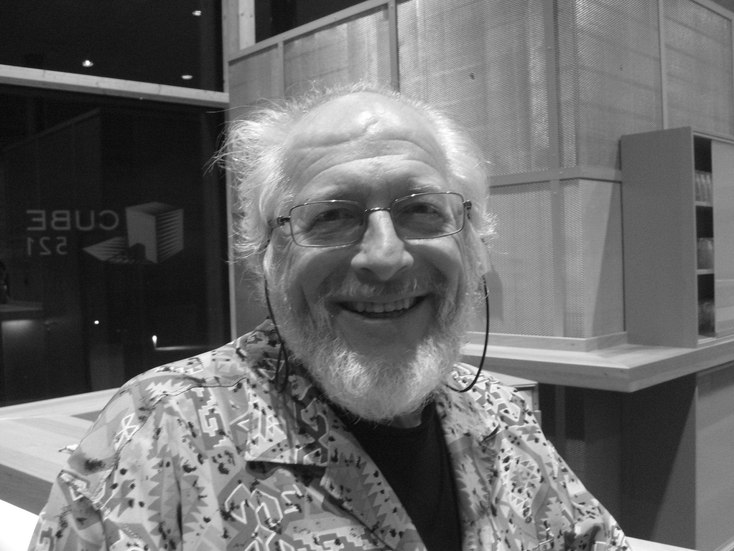 Sujet : De Fotograf Raymond Clement am Cube 521 zu Maarnech.